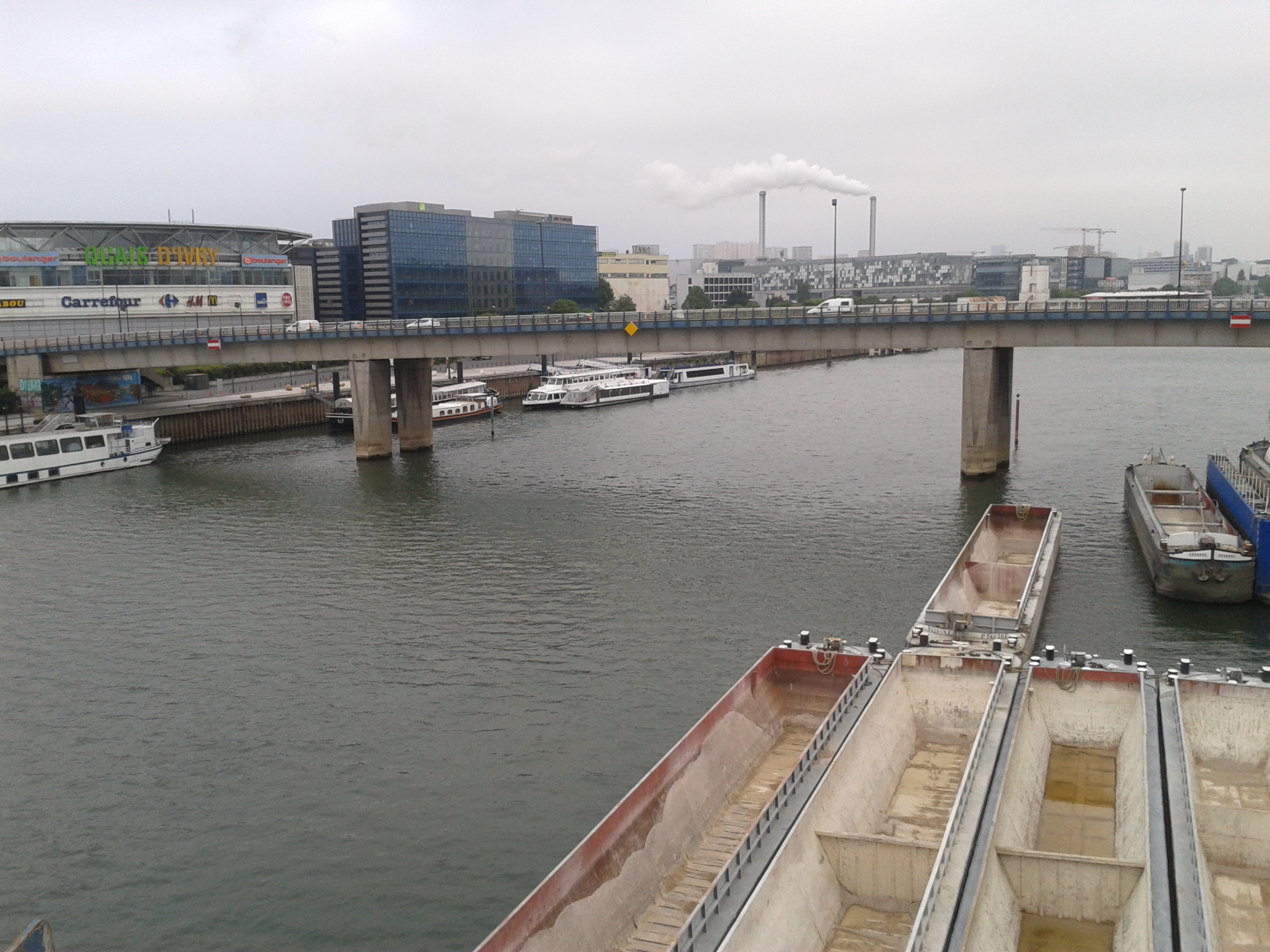 Vue de la Seine entre les Ponts Nelson-Mandela à Ivry-sur-Seine depuis Charenton.